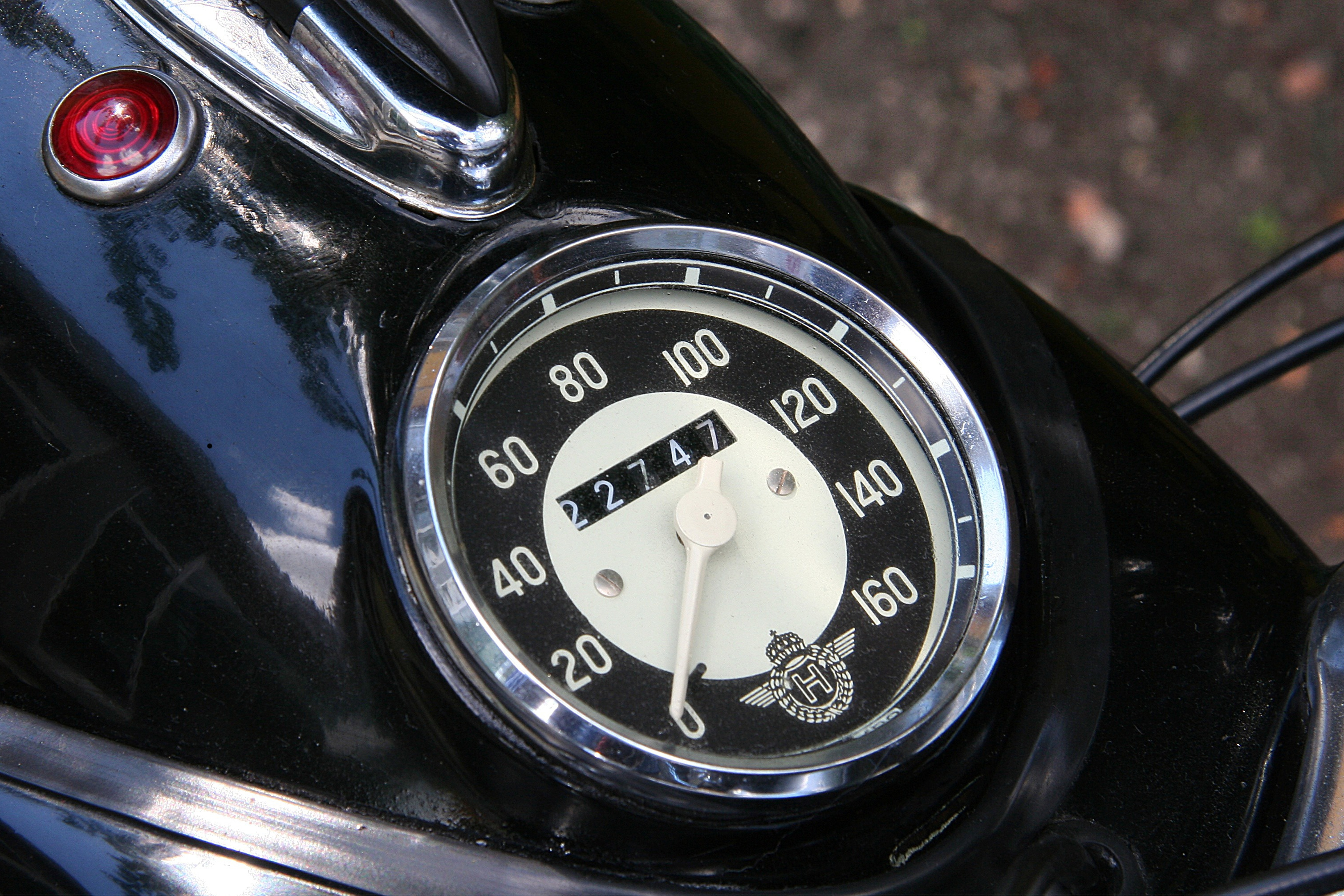 Tachometer einer Horex Imperator, Baujahr 1956